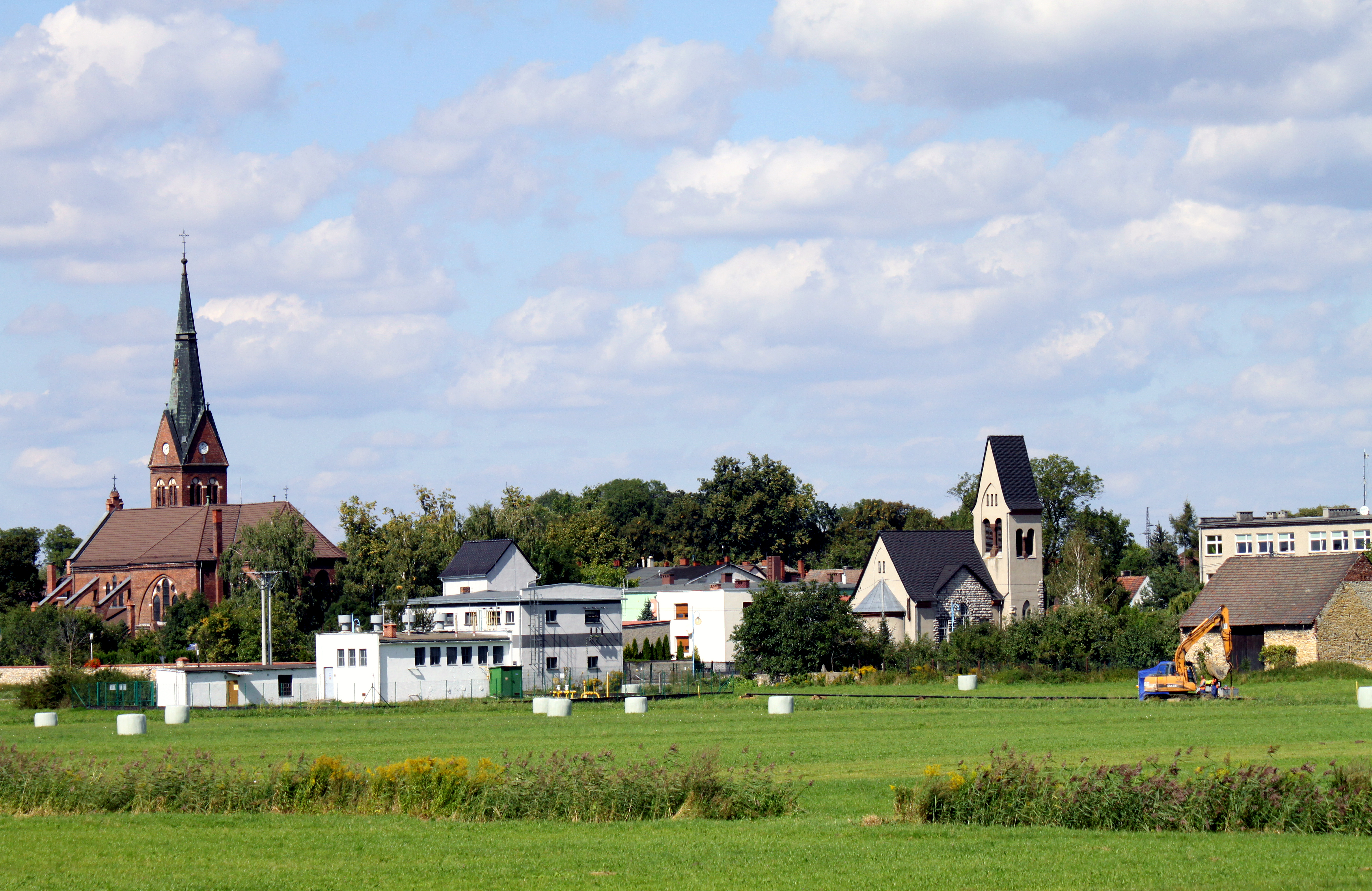 Gogolin